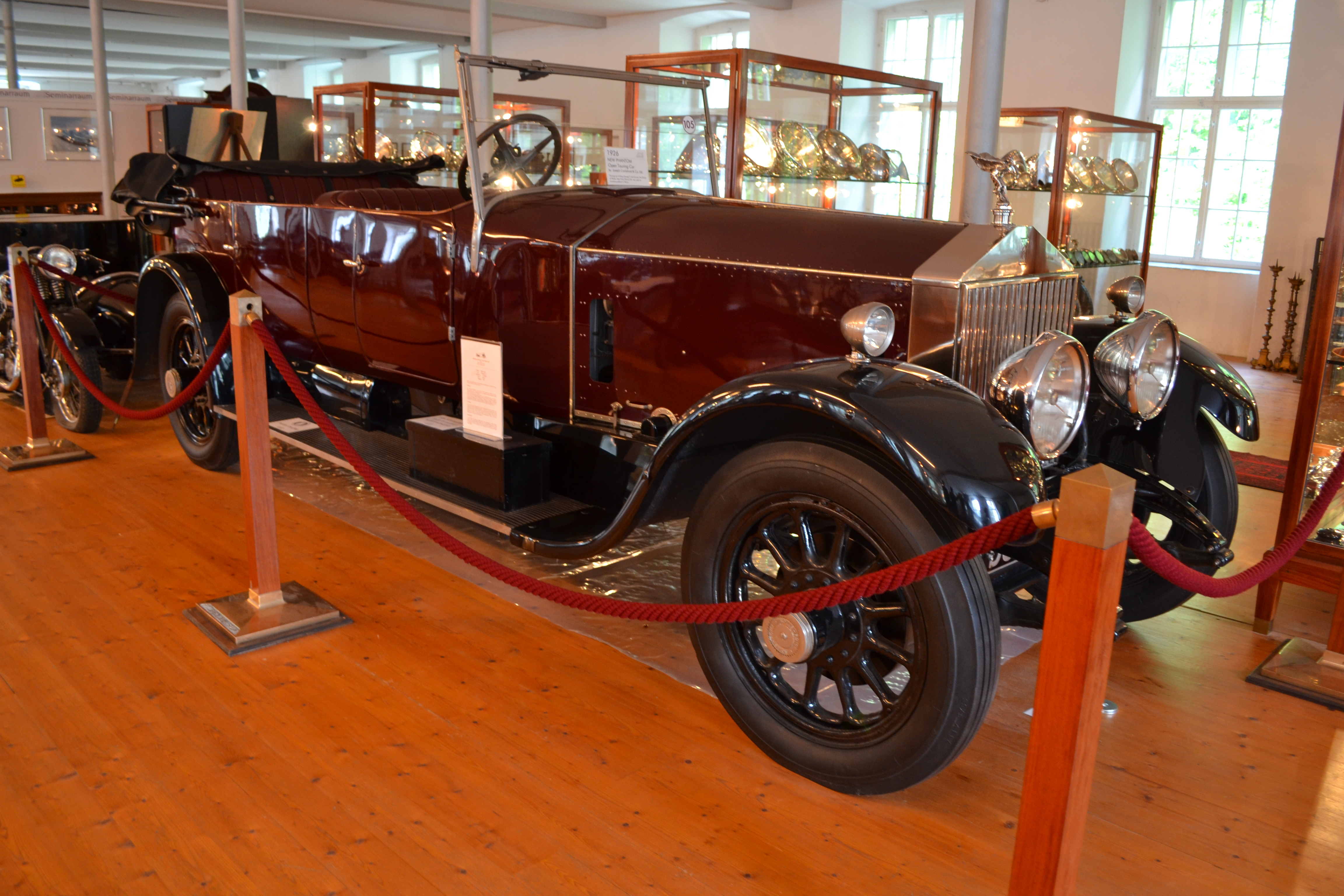 A Rolls-Royce Múzeum Dornbirnben